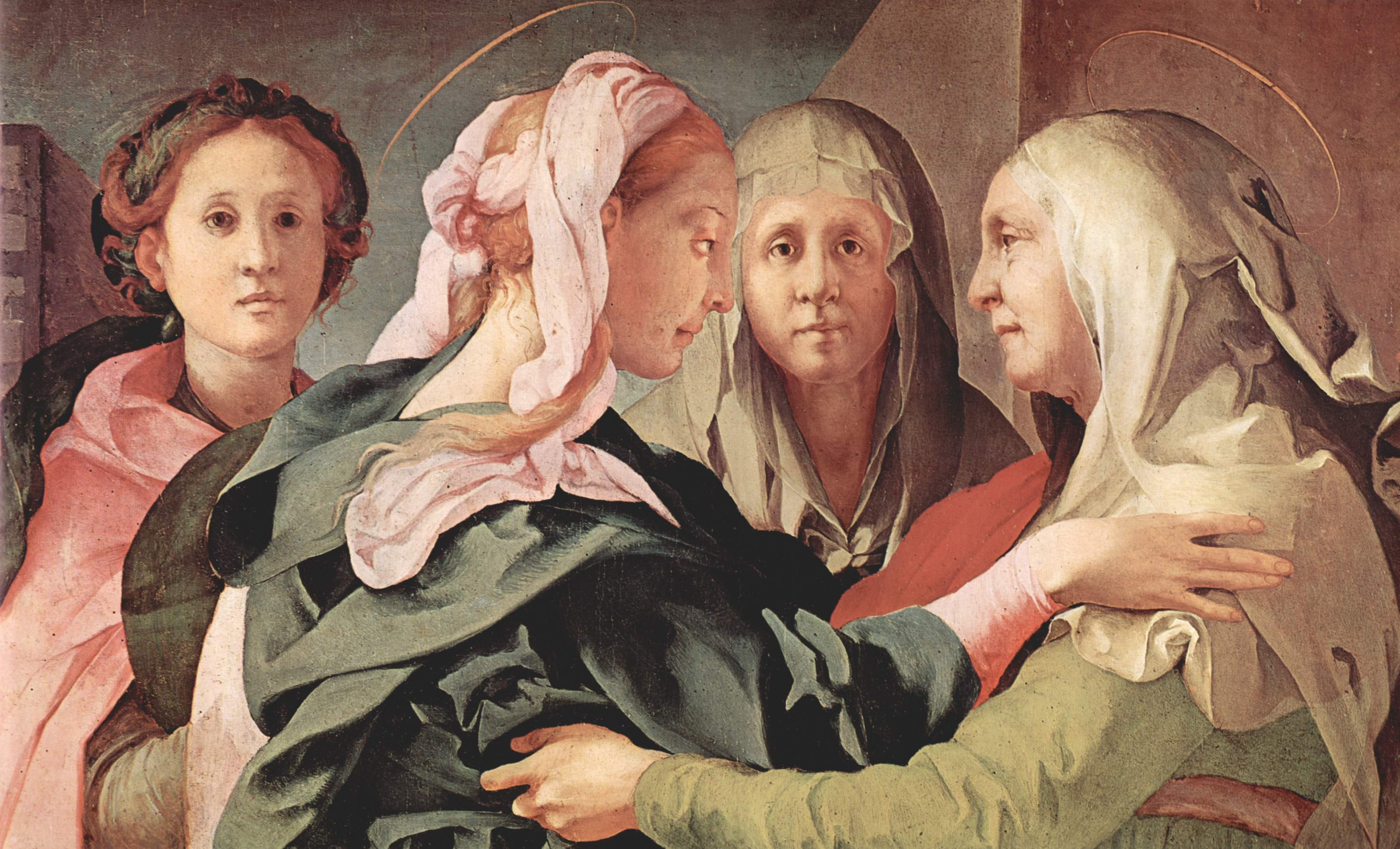 detail: Umarmung Maria und Hl. Elisabeth, im Hintergrund Anna